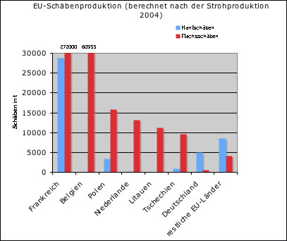 Balkendiagramm: Produktion Flachs- und Hanfschäben in der EU / graph: flax and hemp shive production in the EU. Datenquelle: Michael Carus u.a.: Studie zur Markt- und Konkurrenzsituation bei Naturfasern und Naturfaser-Werkstoffen (Deutschland und EU). Gülzower Fachgespräche 26, hrsg. von der Fachagentur Nachwachsende Rohstoffe e.V., Gülzow 2008, S. 48f.